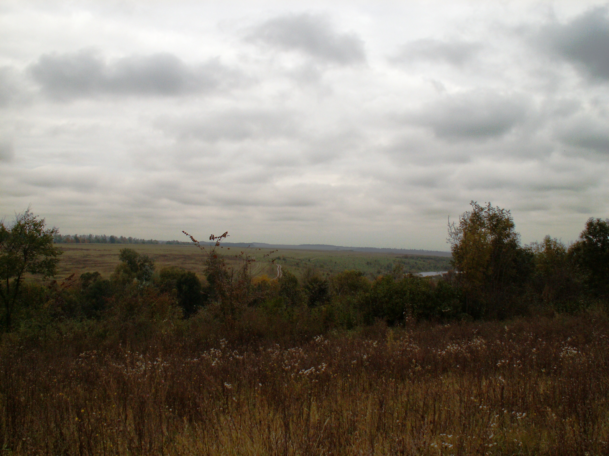 Mayaniv, Ukraine, Landscape 1